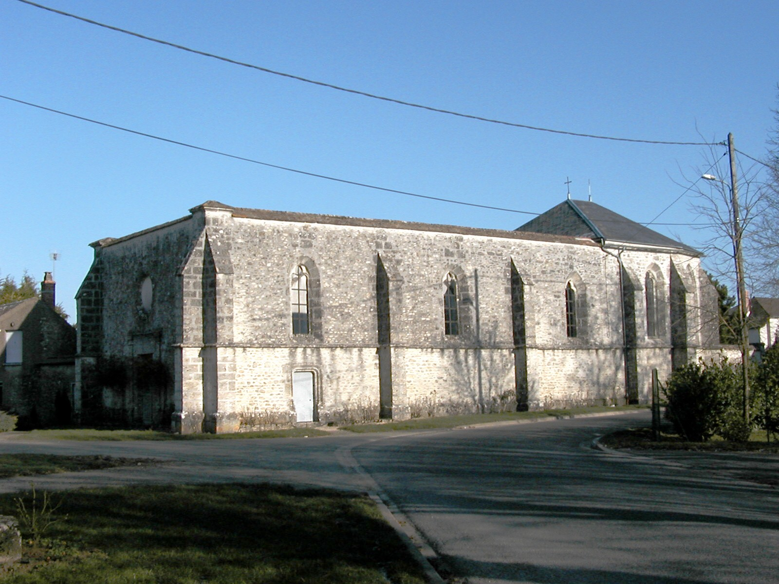 Vue d'ensemble de la chapelle d'Arbouville (Rouvray-Saint-Denis)